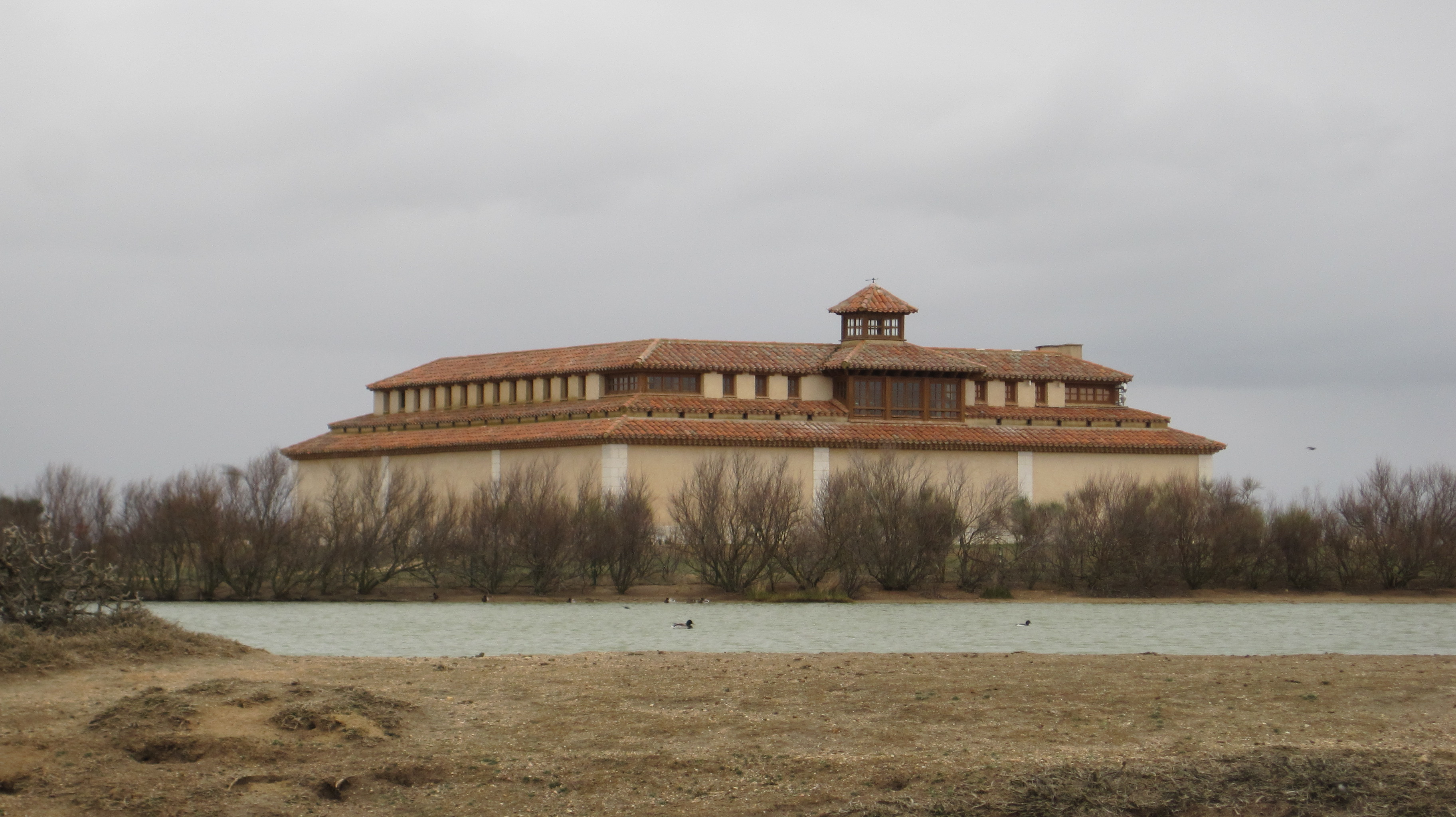 Casa del Parque en Villafáfila, Zamora.